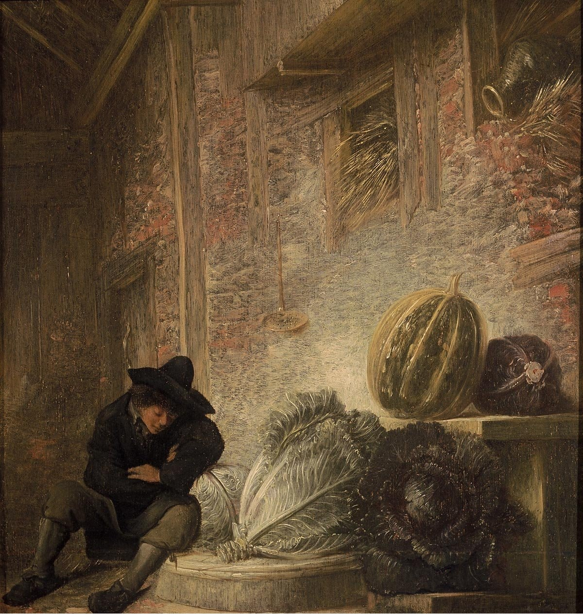 Slapende jongen in een stal.